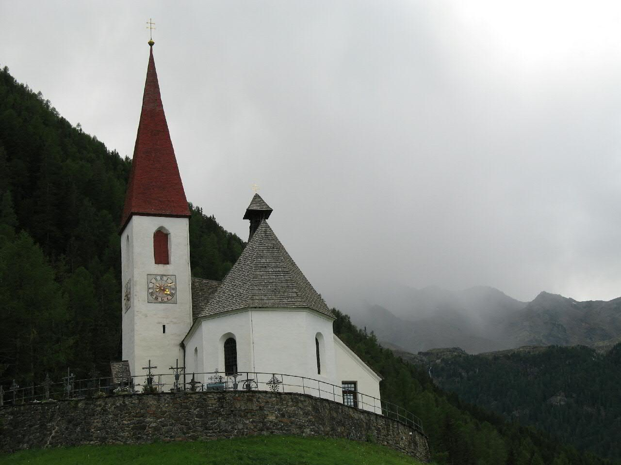 Chiesetta di Santa Gertrude in Val d'Ultimo, Alto Adige, nel Parco Nazionale dello Stelvio